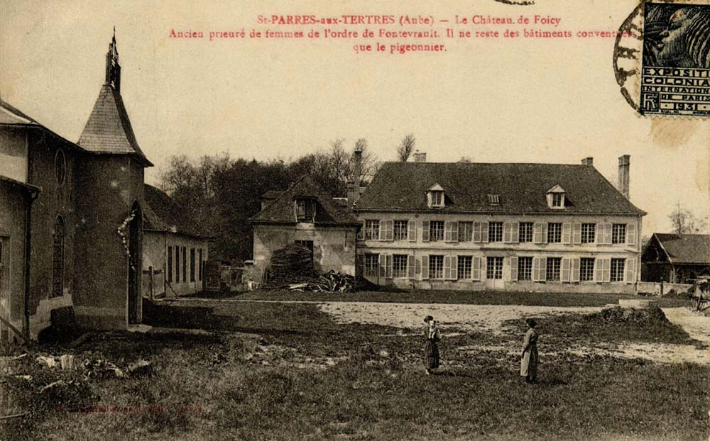 vue, à Saint-Parres-Aux-Tertres du prieuré actuel chateau